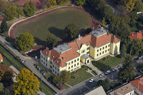 Bonyhádi Petőfi Sándor Evangélikus Gimnázium és Kollégium - légi fotó